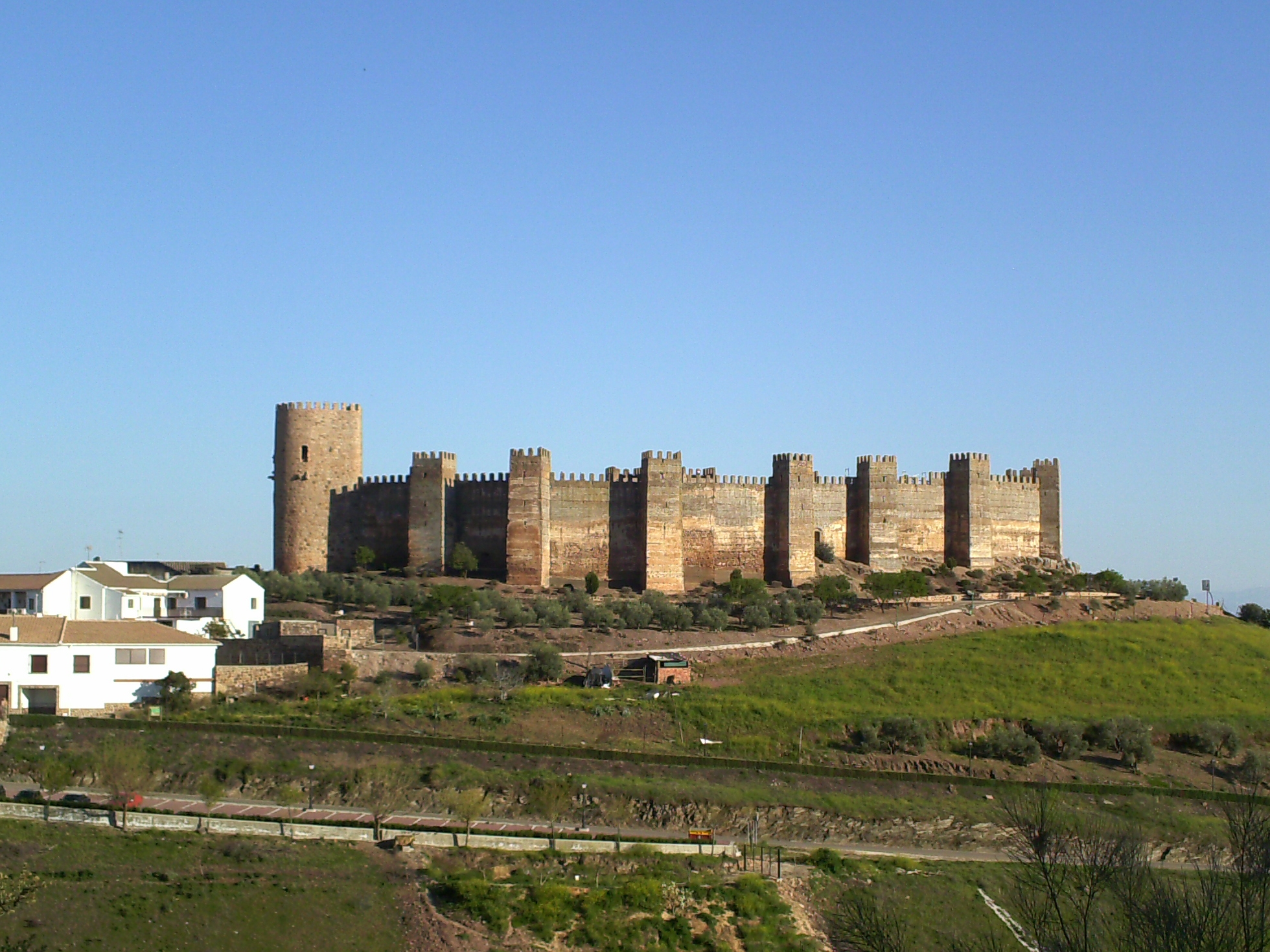 Castillo de Burgalimar.